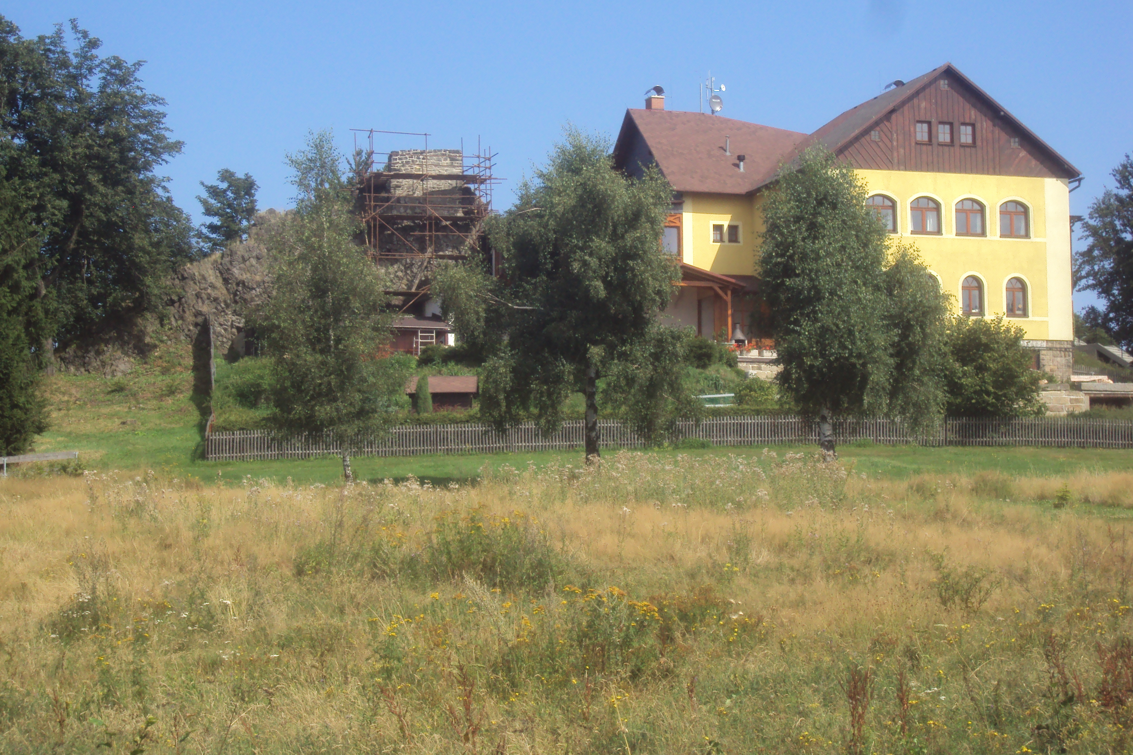 Vrchol Jánských kamenů